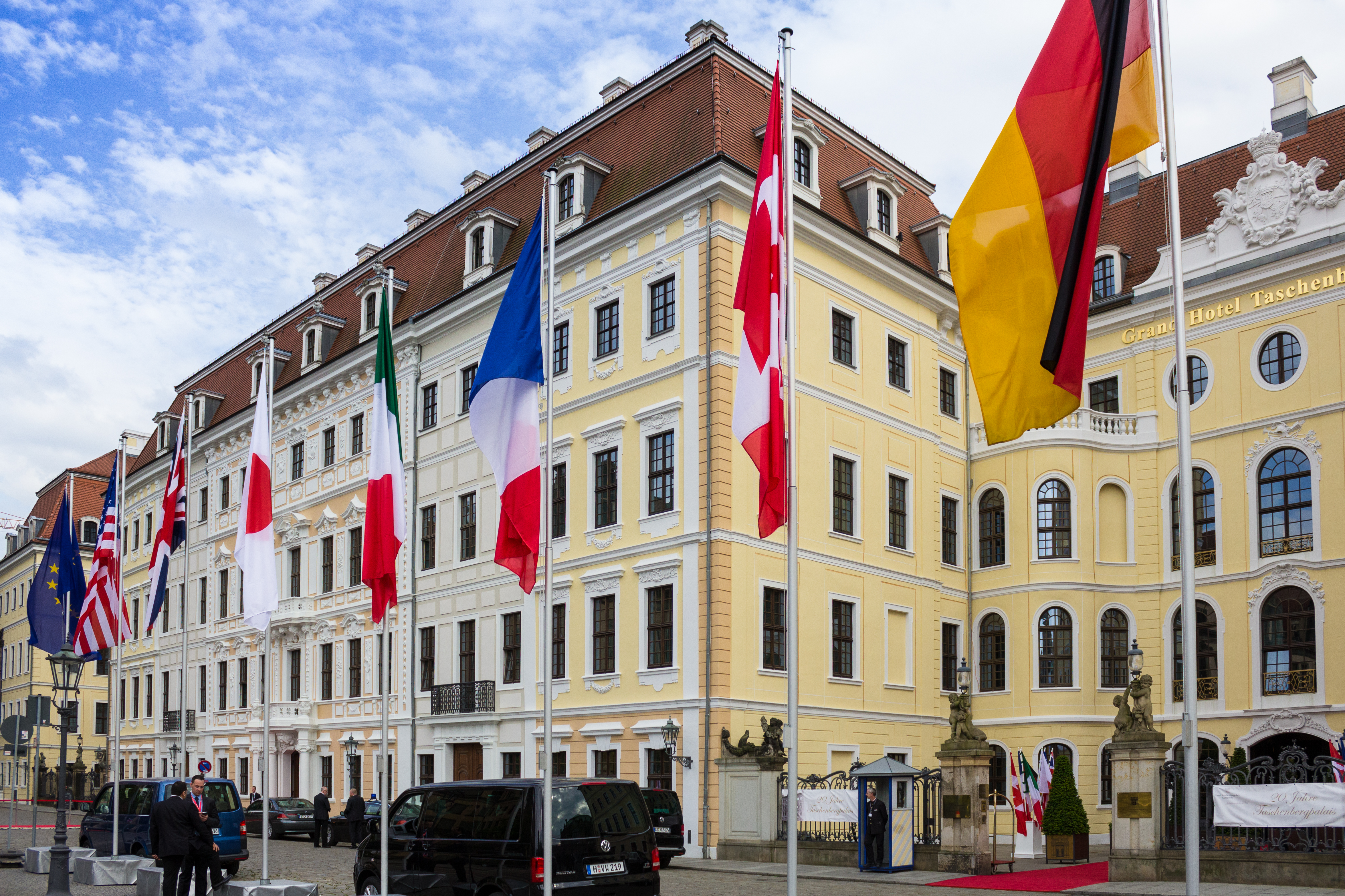 G7 Meeting of finance ministers 2015 Dresden, Germany